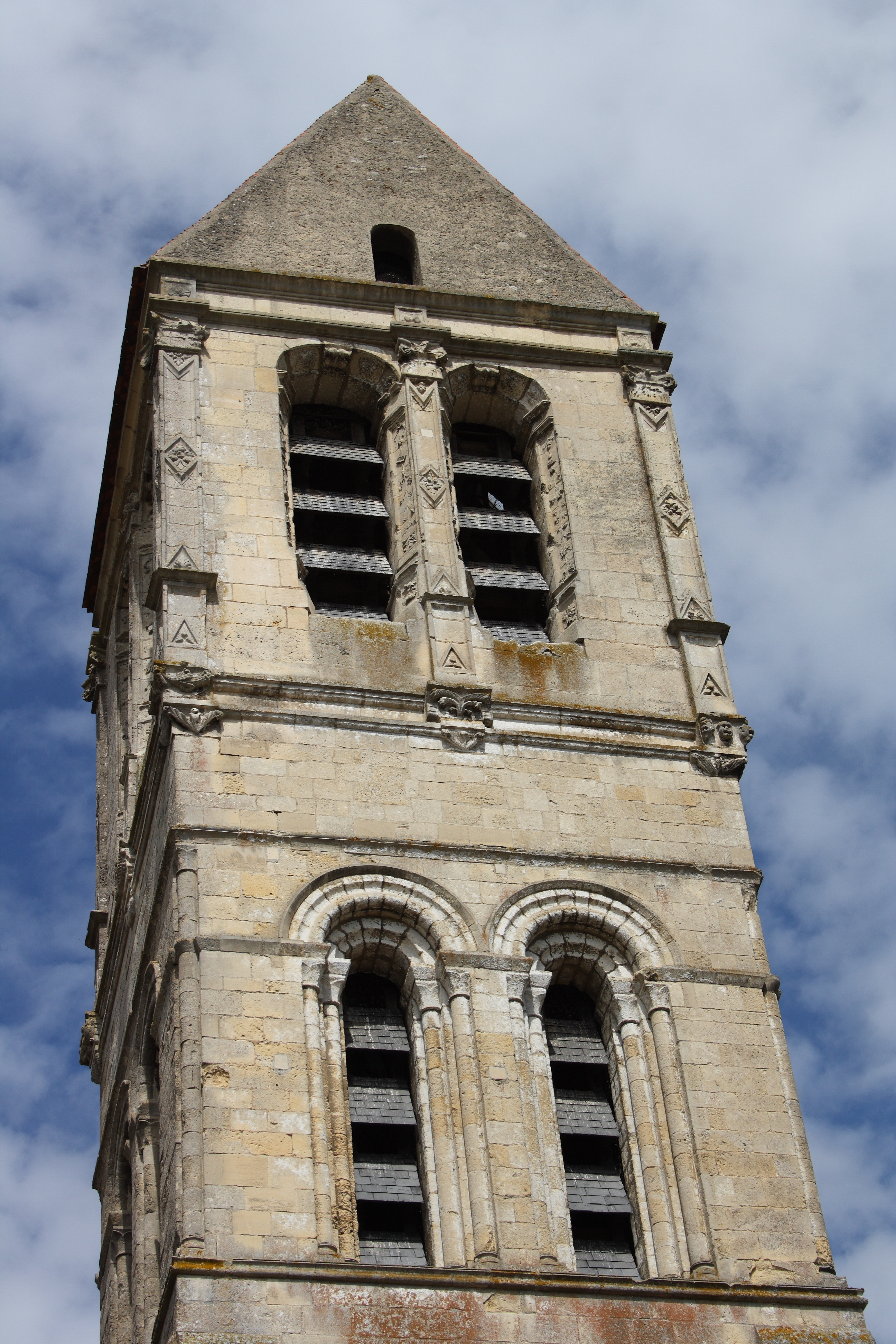 Katholische Kirche Saint-Côme-et-Saint-Damien in Luzarches, einer Gemeinde im Département Val-d'Oise (Île-de-France), Glockenturm, unten: romanisches Geschoss mit Zwillingsfenstern; oben: Turmaufbau, 1537 von Jean Guillot im Stil der Renaissance errichtet